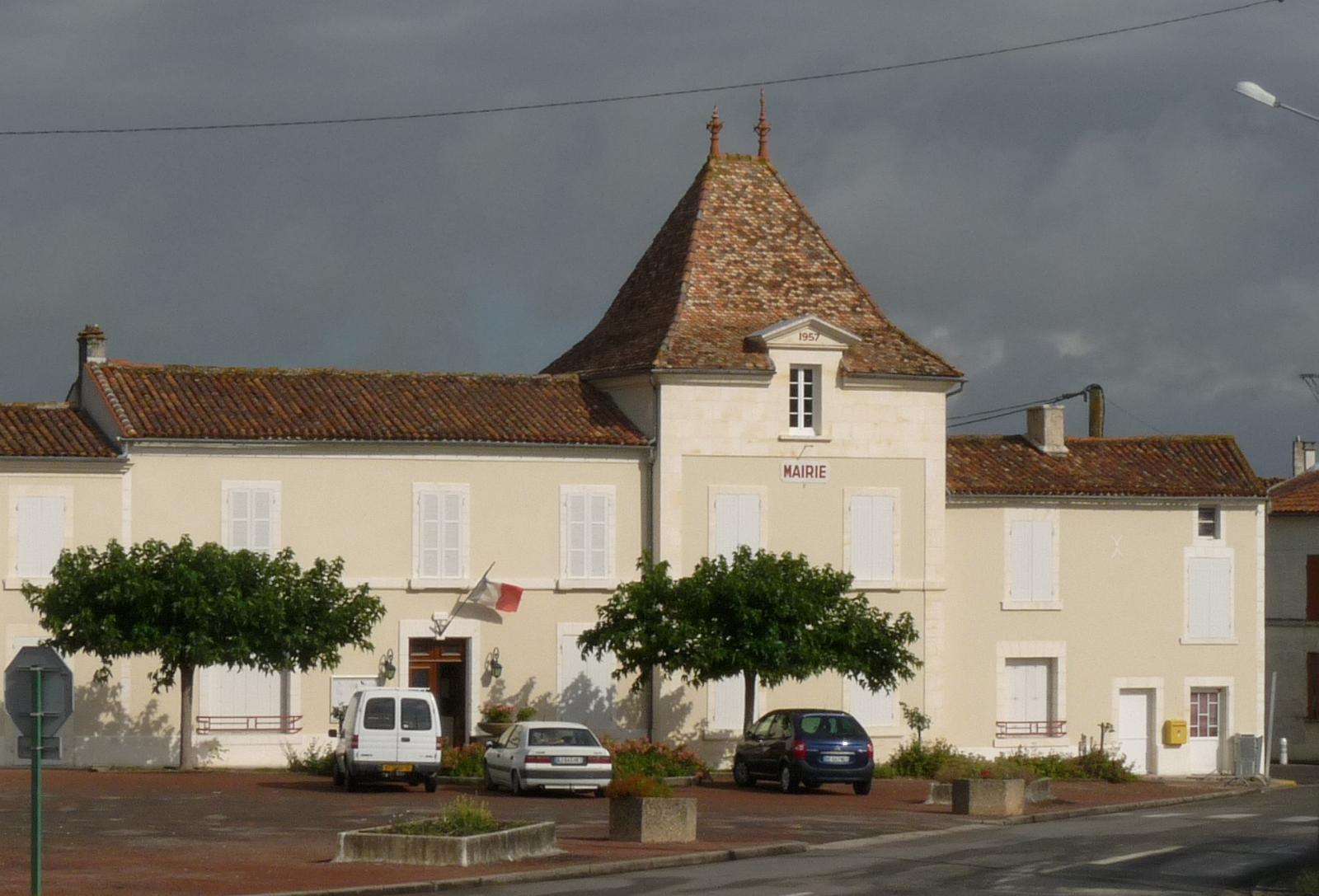 Mairie de Juillac-le-Coq, Charente, France